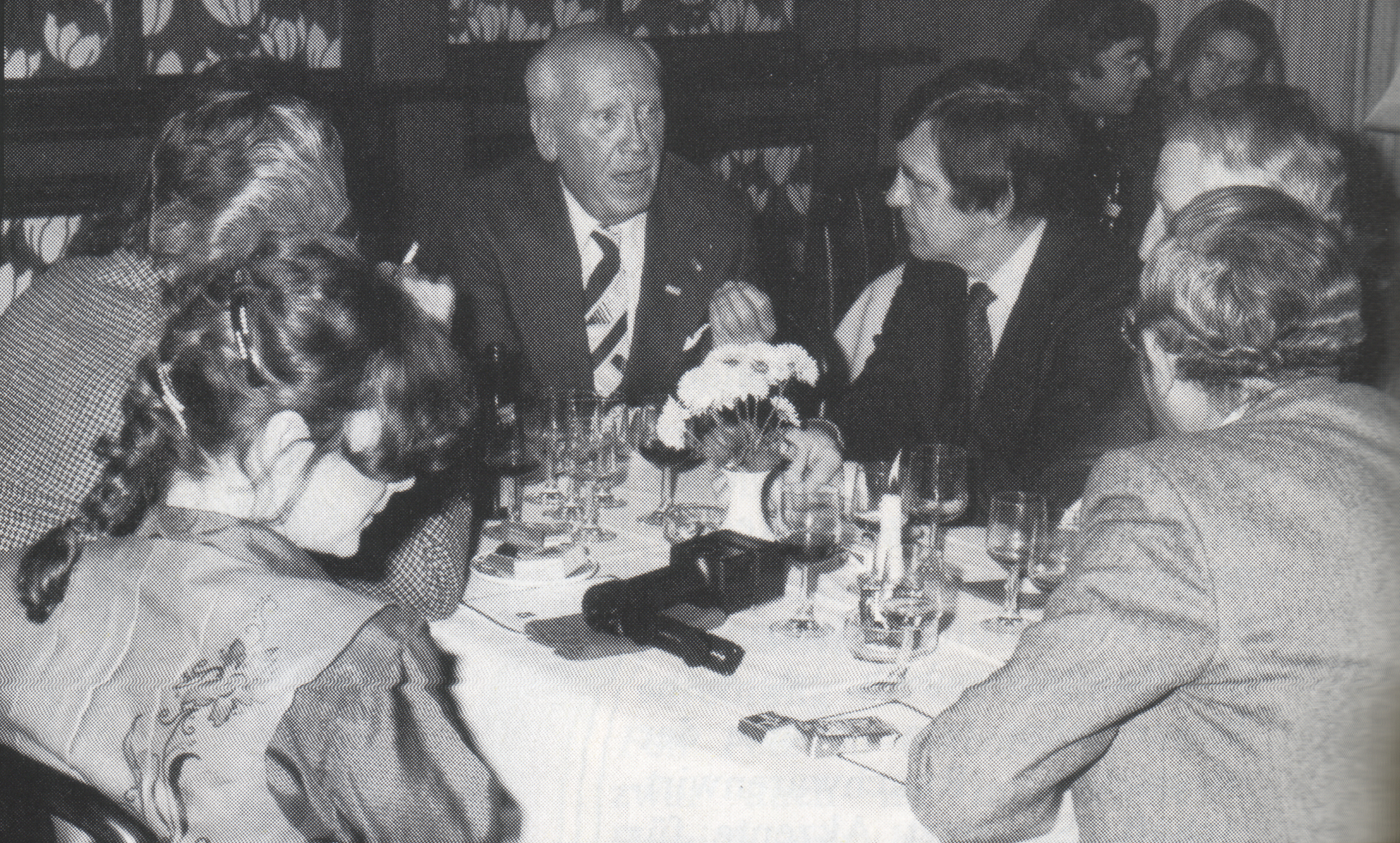 Dr. Heinz Levié* (Bildmitte), Rauchwarenveredler, Chef der Firma Marco, Fränkische Pelzindustrie Märkle & Co, Fürth, am Abend einer Pelzveredlertagung in Fürth: „Der Gastgeber, Dr. Levié, rief die deutschen Pelzveredler bei dieser Gelegenheit zu noch mehr Solidarität auf.“ Dr. Levié war Bürgermeister der Stadt Nürnberg von 1946 bis 1948. 23.10.1983: Der 1910 in Hofgeismar in Hessen geborene Heinz Levié stirbt in Fürth. Als so genannter „Halbjude“ war er 1933 aus seinem Amt bei der Staatsanwaltschaft Halle entlassen worden und zudem 1942-45 als NS-Gegner inhaftiert. Nach Kriegsende kam Levié nach Nürnberg, wo ihn die amerikanische Militärregierung 1946 zum Bürgermeister ernannte. Diese Aufgabe nahm er bis 1948 wahr. Sein Augenmerk galt besonders dem wirtschaftlichen Wiederaufbau, der Entnazifizierung und der Versorgung der NS-Opfer. (Stadtarchiv Nürnberg)